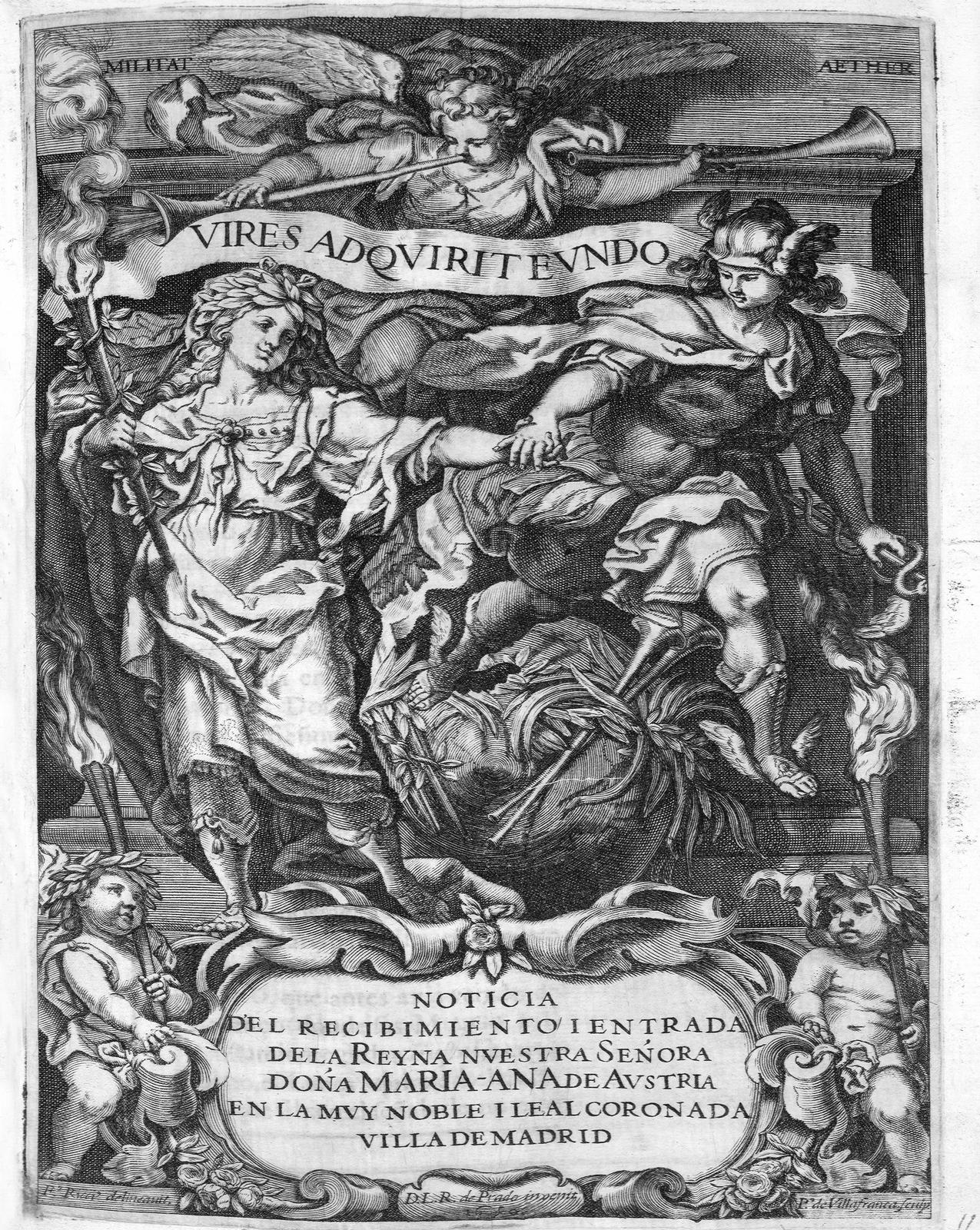 Grabado de Pedro de Villafranca sobre dibujo de Francisco Rizi para la obra de Lorenzo Ramírez de Prado: Noticia del recibimiento y entrada de la reina Maria Ana de Austria en la muy noble y leal coronada villa de Madrid (S.l., s.n., s.a.) 1650. Ejemplar de la Universidad de Sevilla.